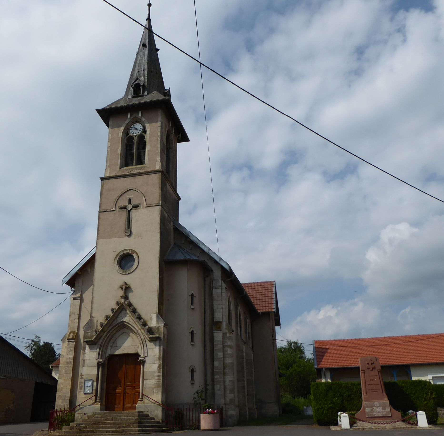 Église Saint-Étienne de Bey-sur-Seille en Meurthe-et-Moselle (France).